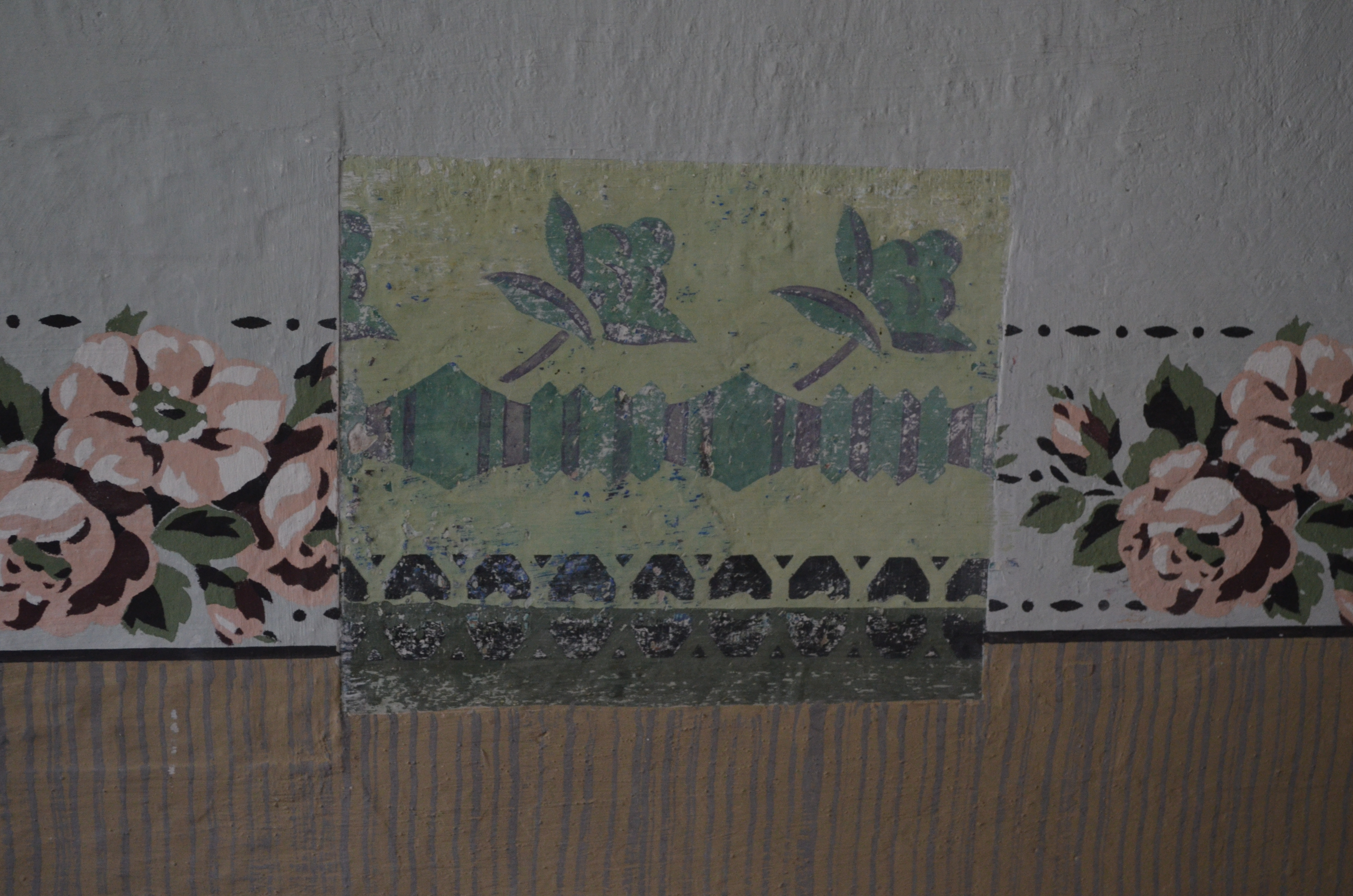 Bergnersreuth (Arzberg-Bavière-Allemagne) - musée du folklore - peinture décorative traditionnelle appliquée à l'aide de pochoirs à l'intérieur du bâtiment de ferme.